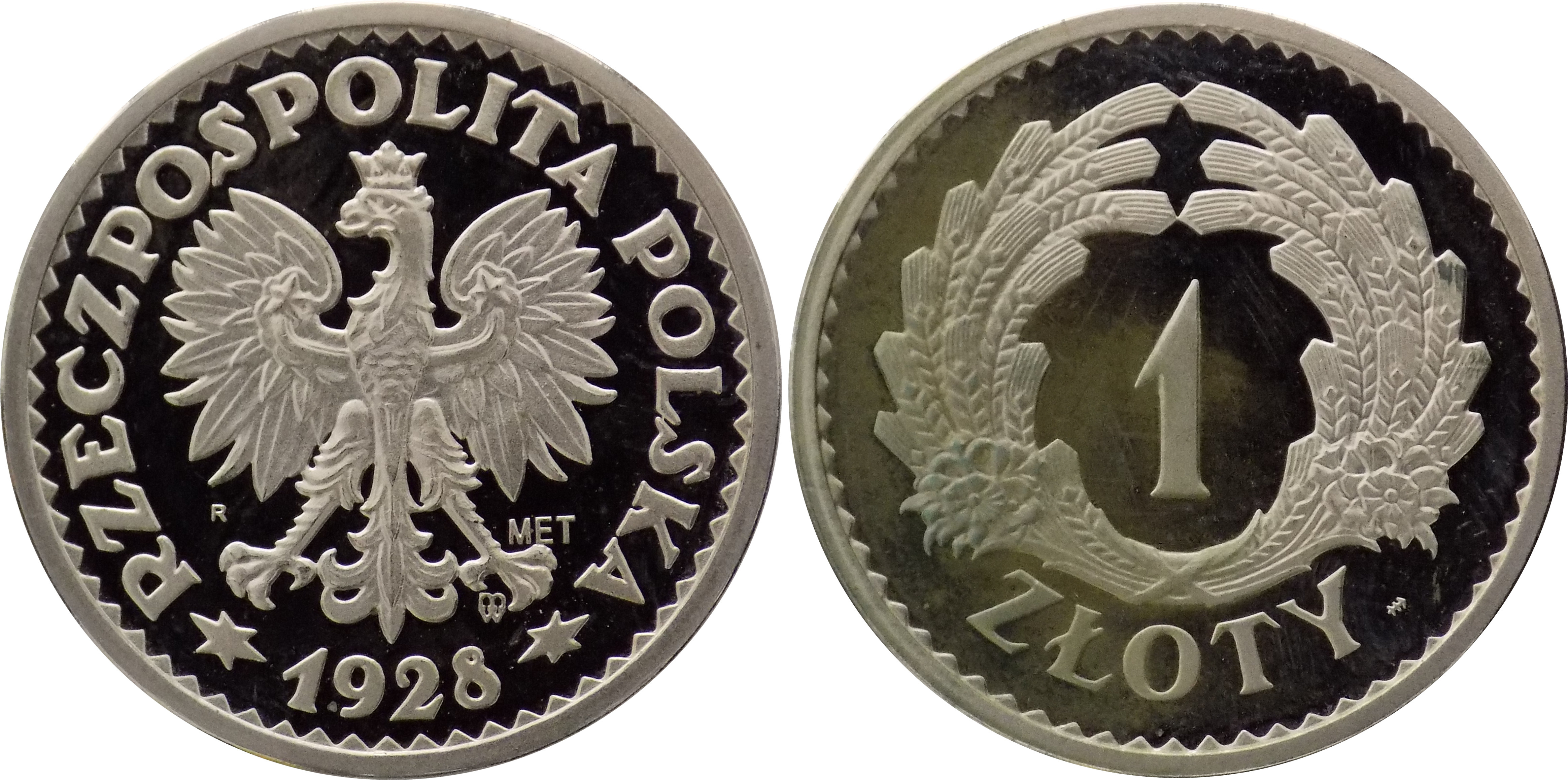 Replika 1 złoty 1928 wieniec z kłosów zboża